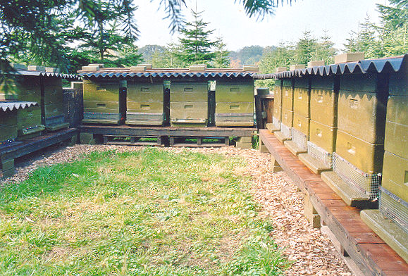 Bienenstand in Kunststoff-Magazinbeuten im Winter